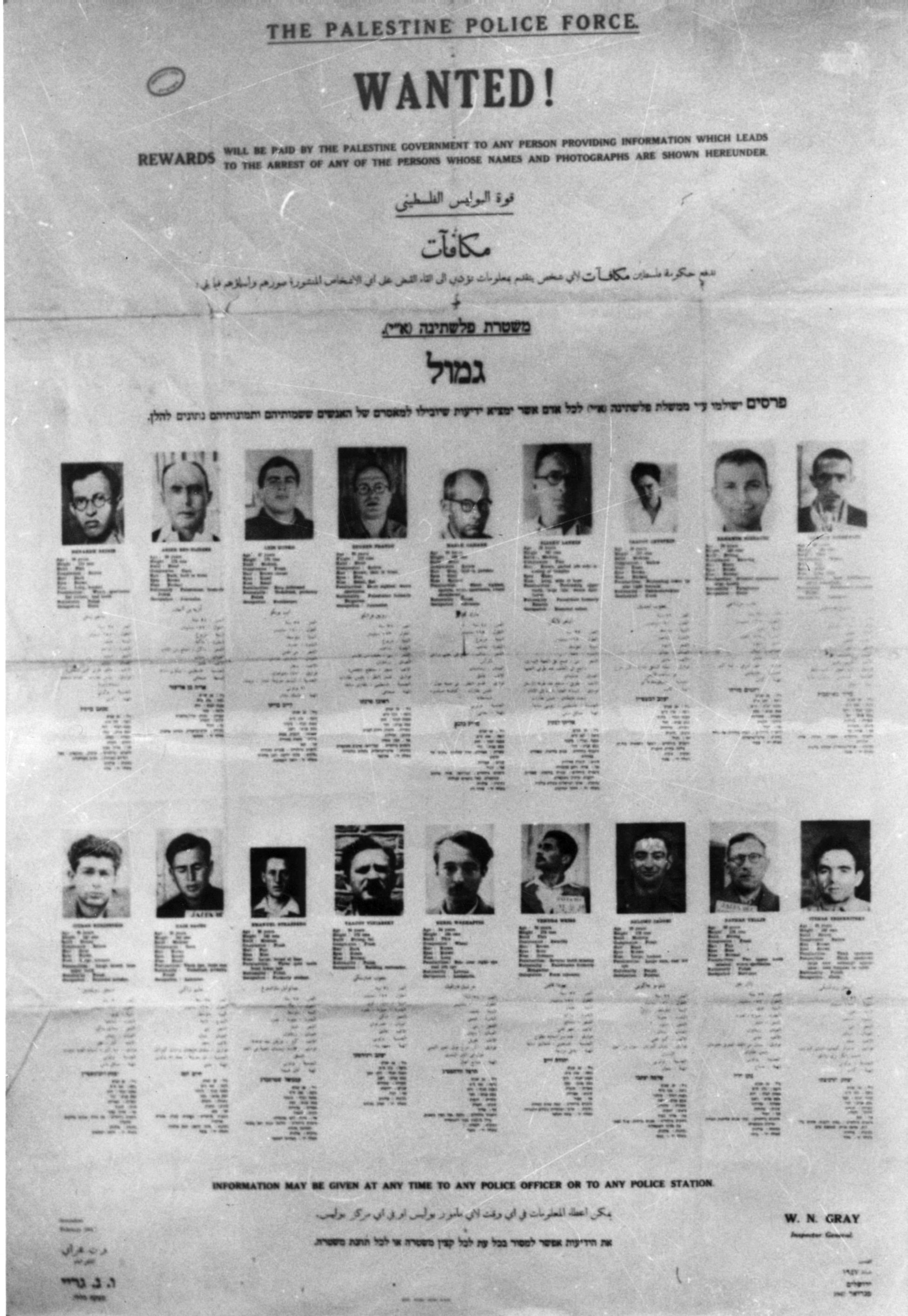 "מודעת מבוקשים של משטרת ארץ ישראל, לגבי חברי אצ"ל וחברי לח"י. למעלה: מנחם בגין, אריה בן-אליעזר, לייב בויקו, ראובן פרנקו, מרק קהאן, אליהו לנקין, יעקב לבשטיין, רחמים מזרחי, ברוך מויסביץ. למטה: יצחק רובינשטיין, חיים זקס, עמנואל שטרסברג, יעקב וינירסקי (מרידור), יהודה וייס, שלמה יעקובי, נתן ילין-מור, יצחק יזרניצקי (שמיר)" 01/02/1947